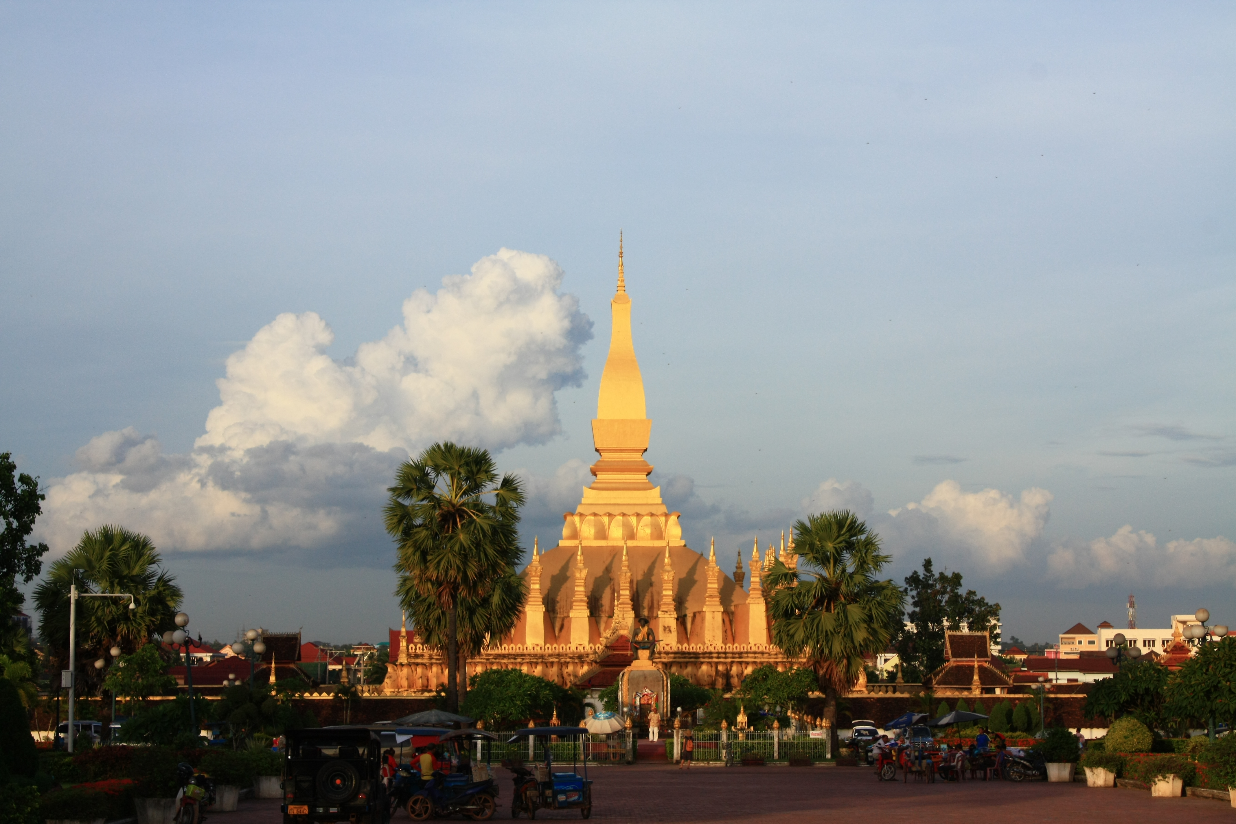 That Luang naplemente Laosz